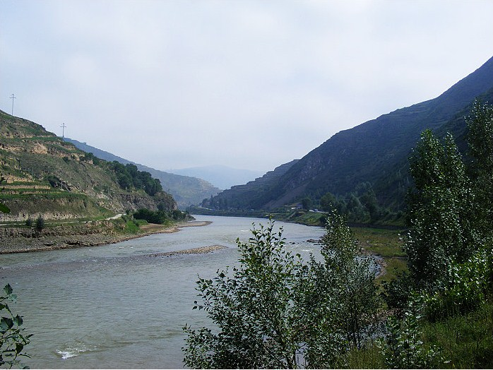 岷县洮河